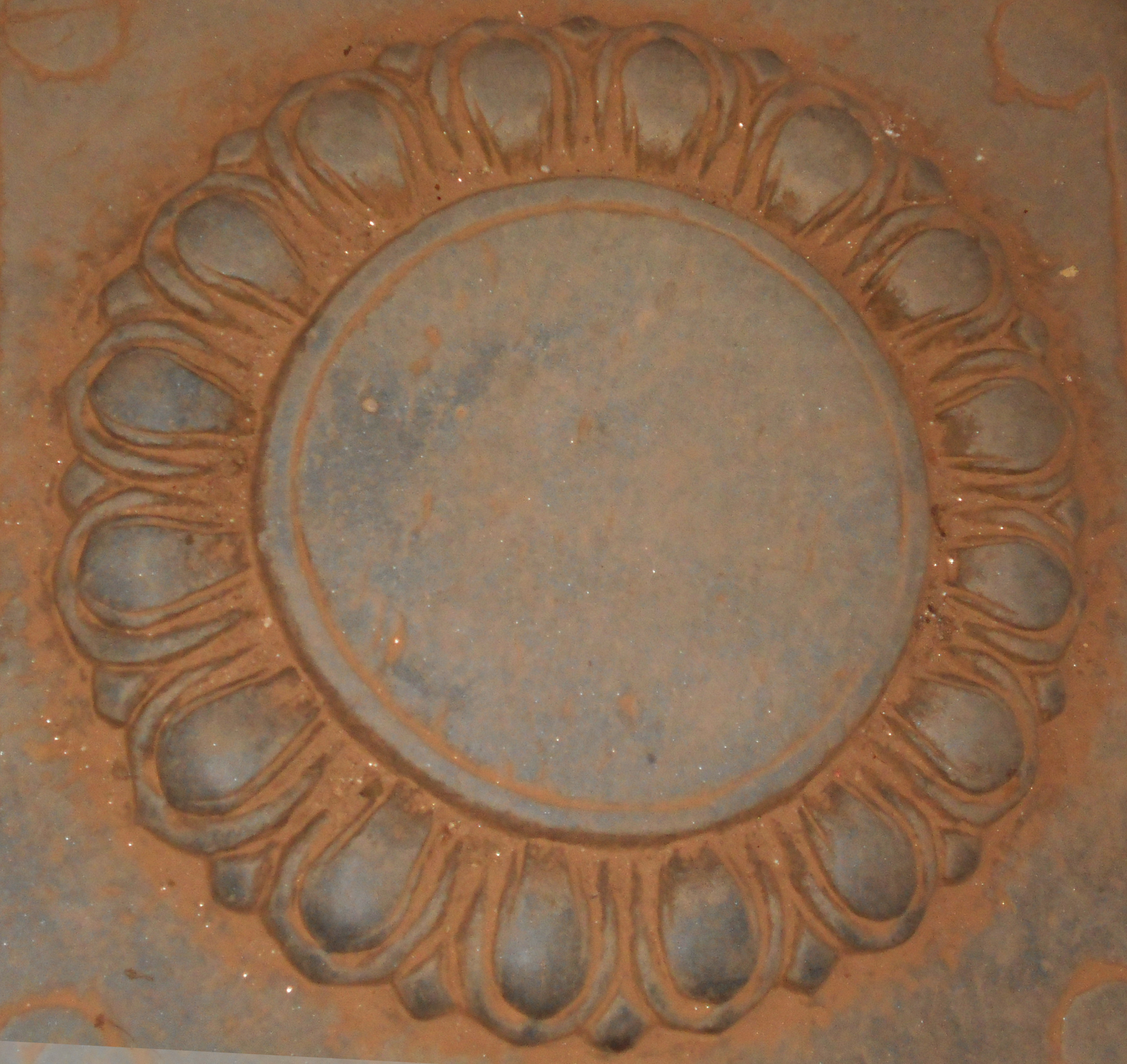 नेपाली: पिखालखु कुमार